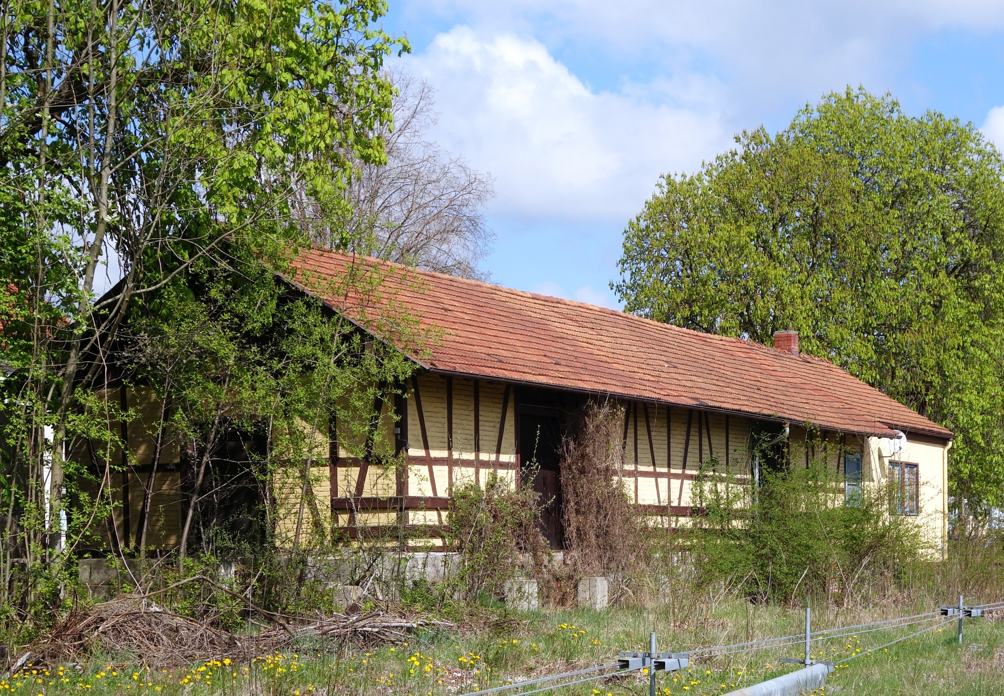 Güterschuppen des Bahnhofs Schongau von der Gleisseite, Zustand April 2014